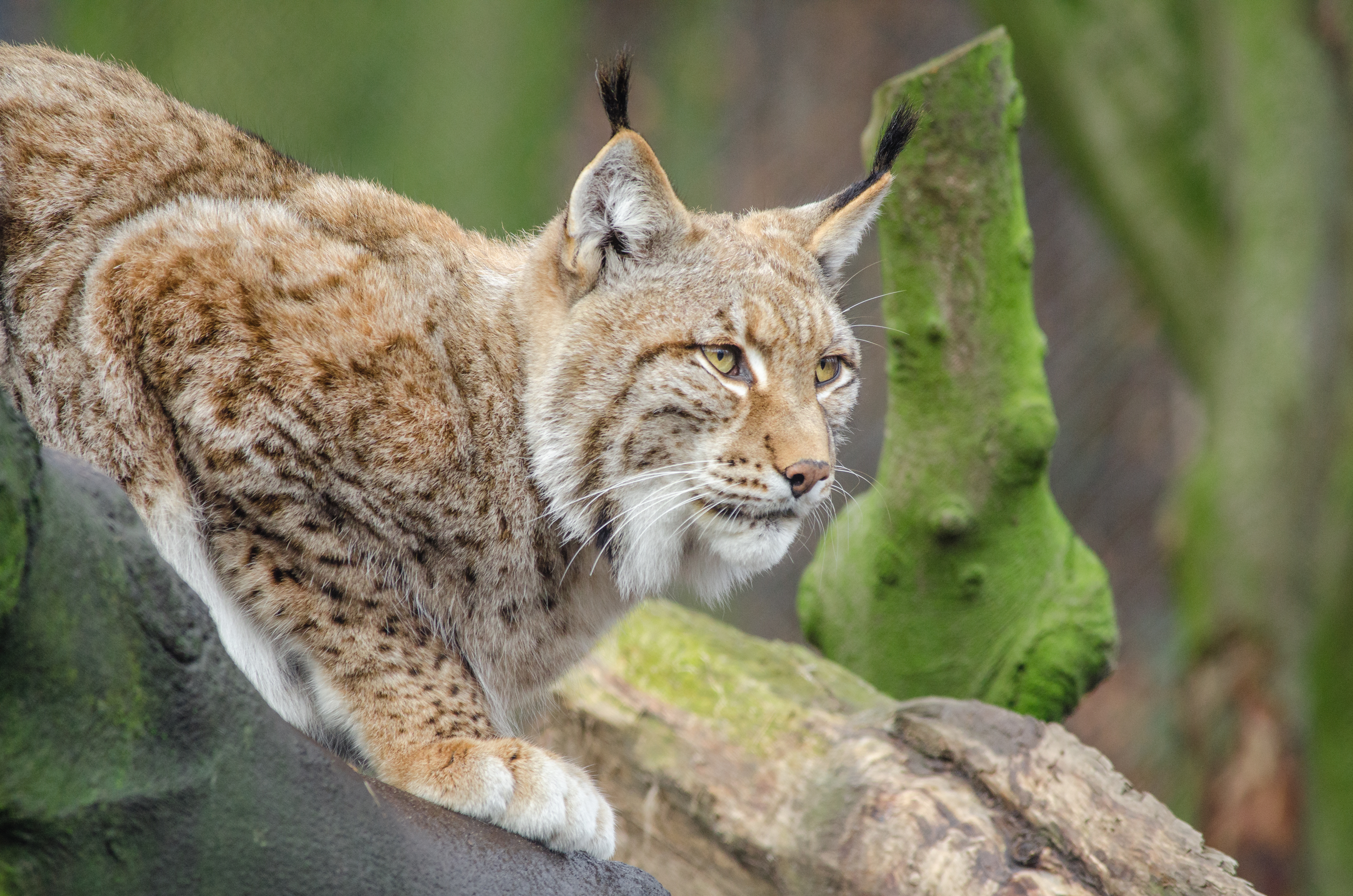 Lynx